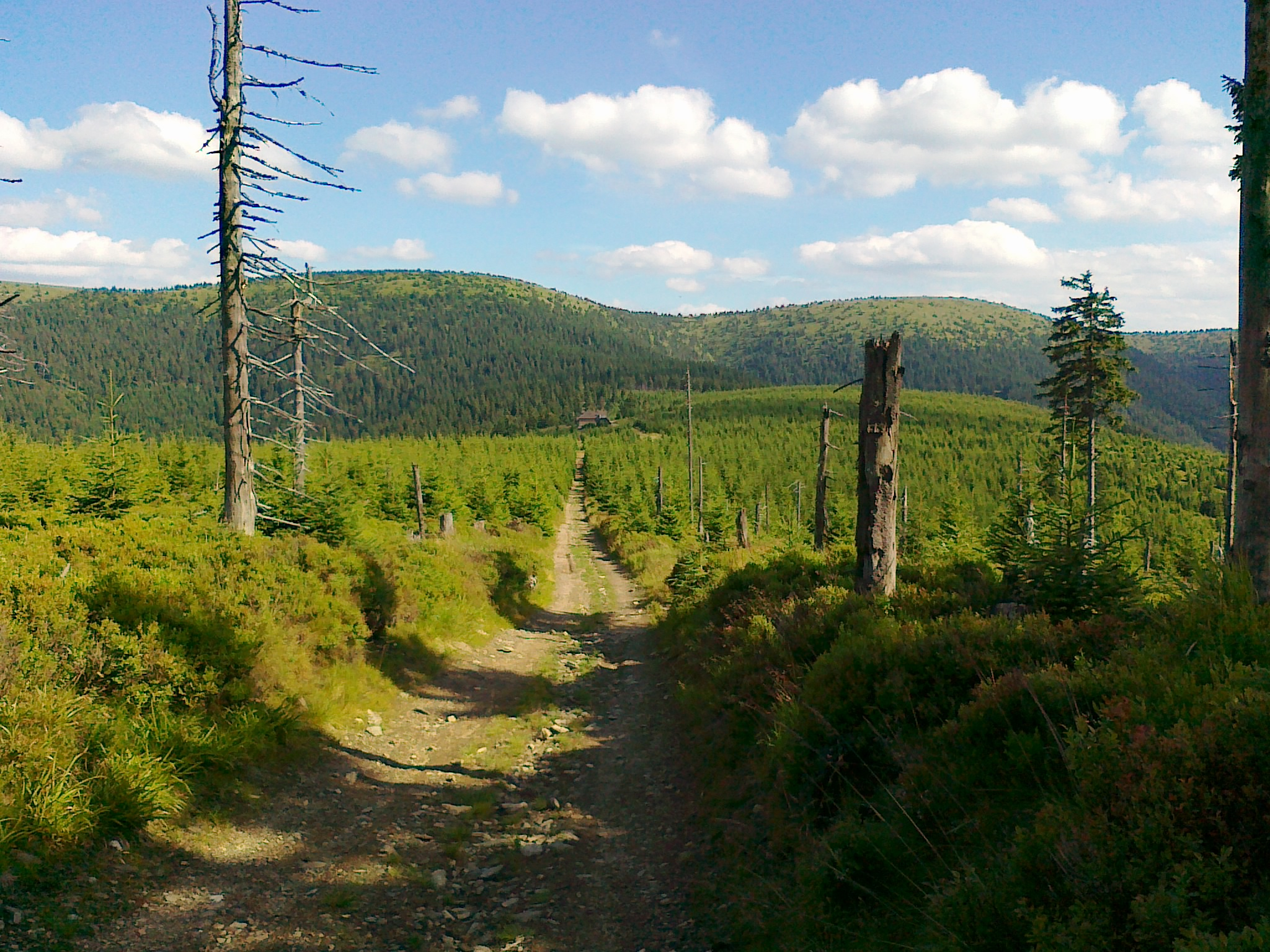 Widok z dróżki prowadzącej na górę Velká Jezerná na góry Velký Máj, Jelení hřbet (poniżej Hubertka).